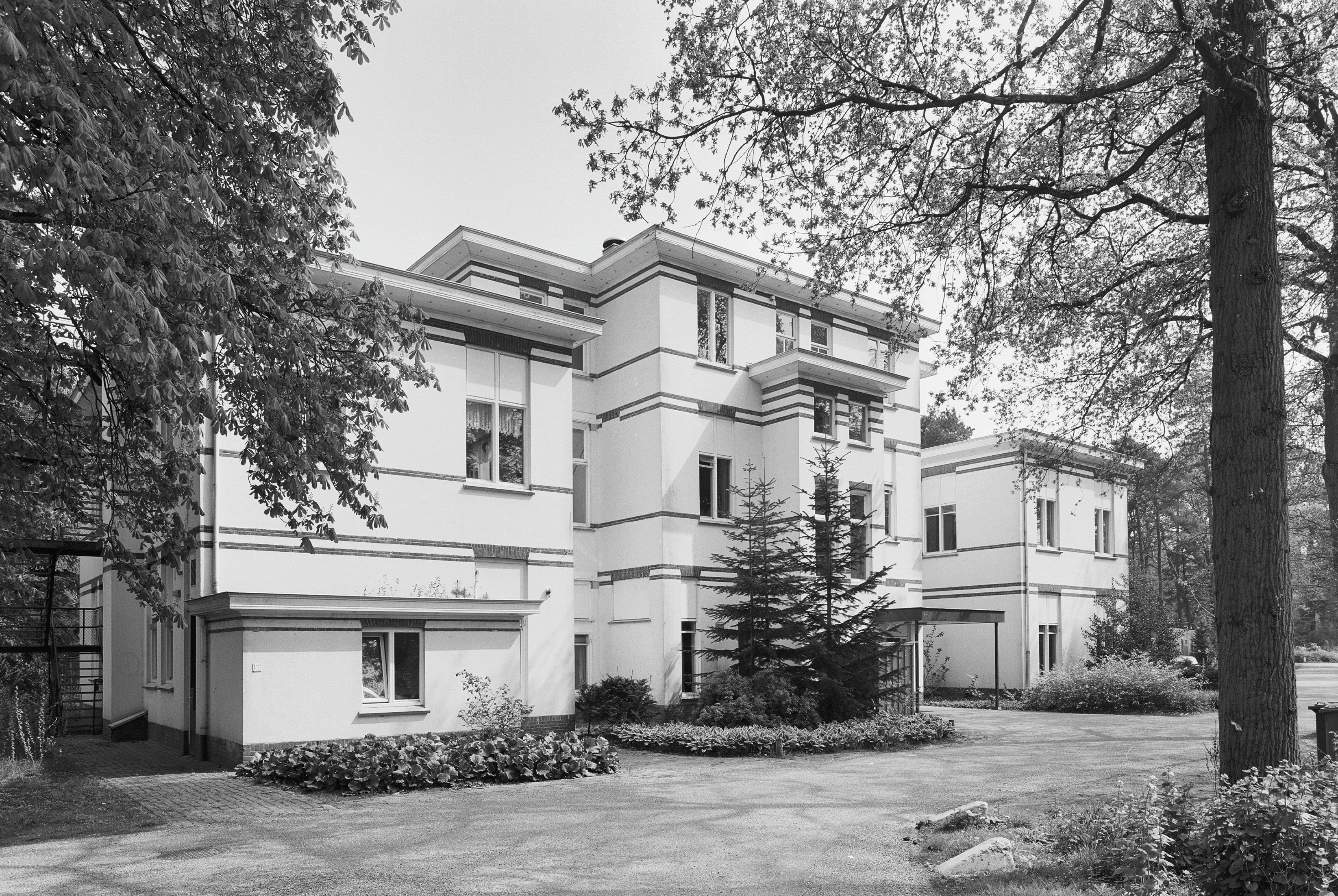 Overzicht paviljoen Wier (opmerking: GB De Utrechtse Heuvelrug)